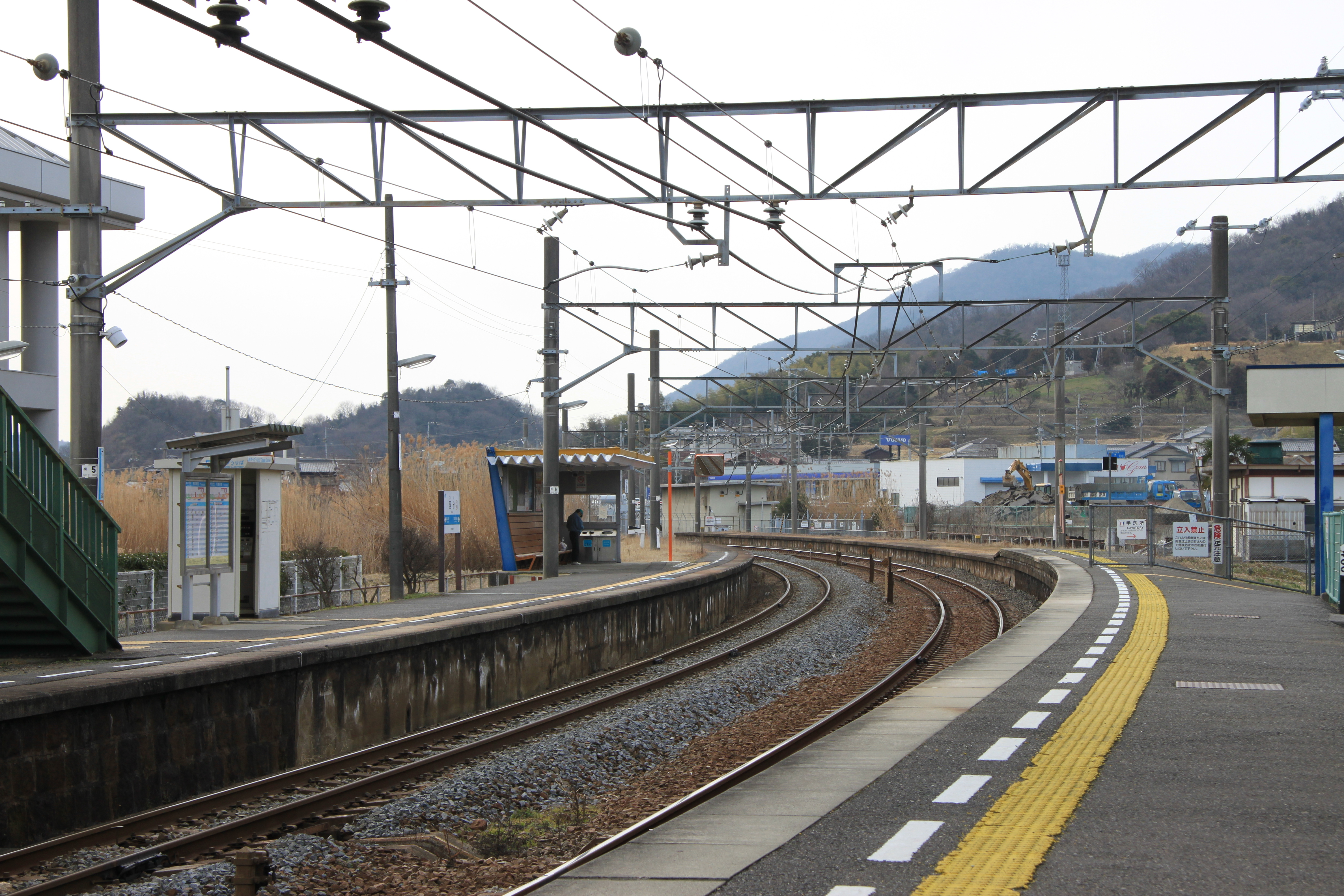 国分駅 構内